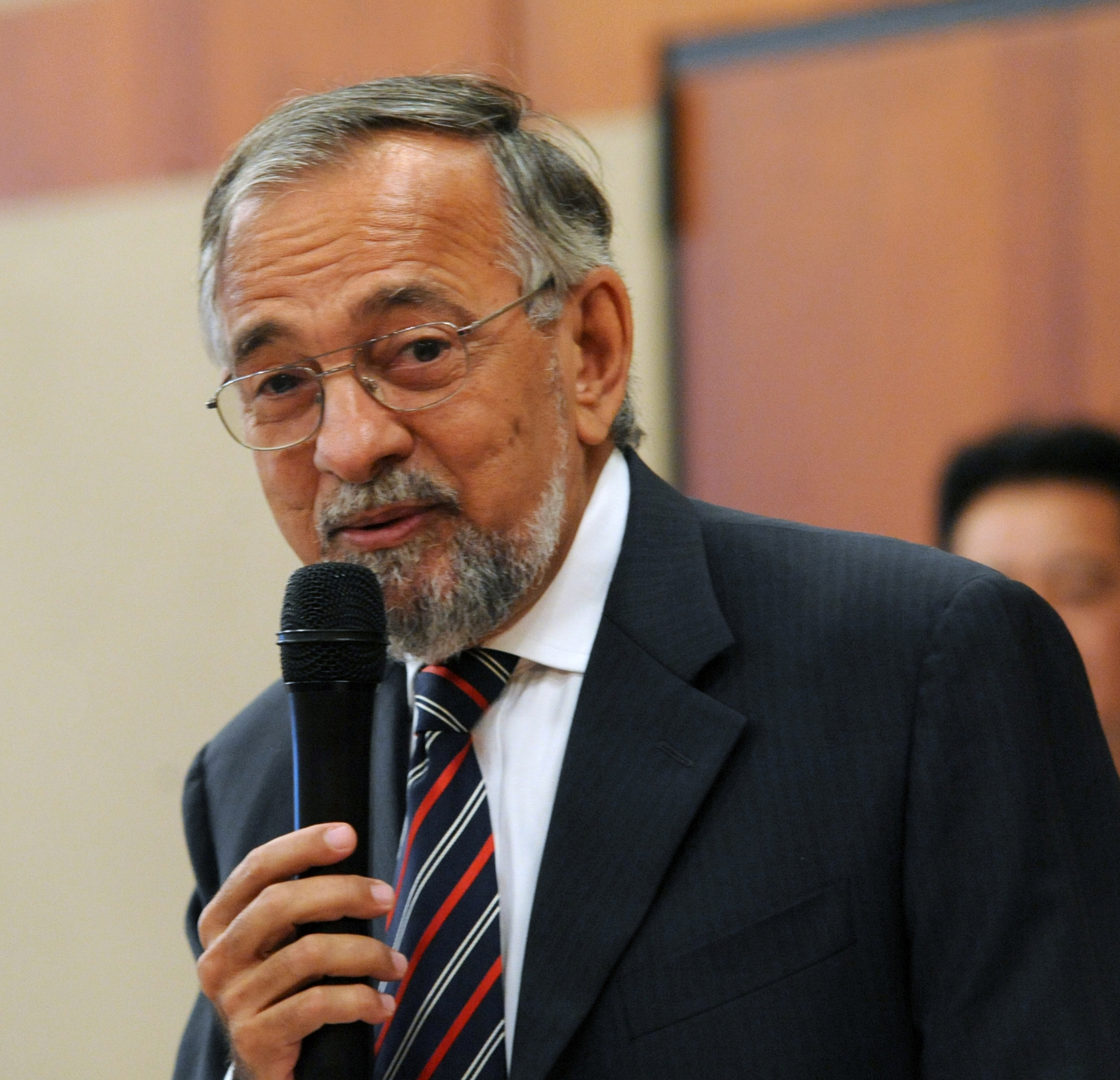 O senador eleito pelo Amapá, João Capiberide, durante reunião da Executiva Nacional do PSB